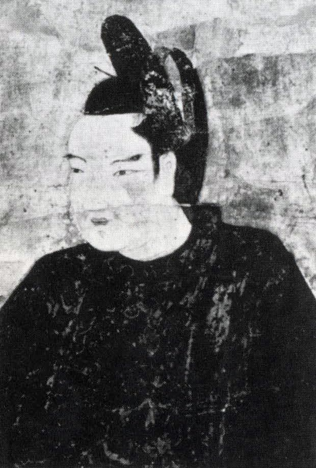 織田秀信画像